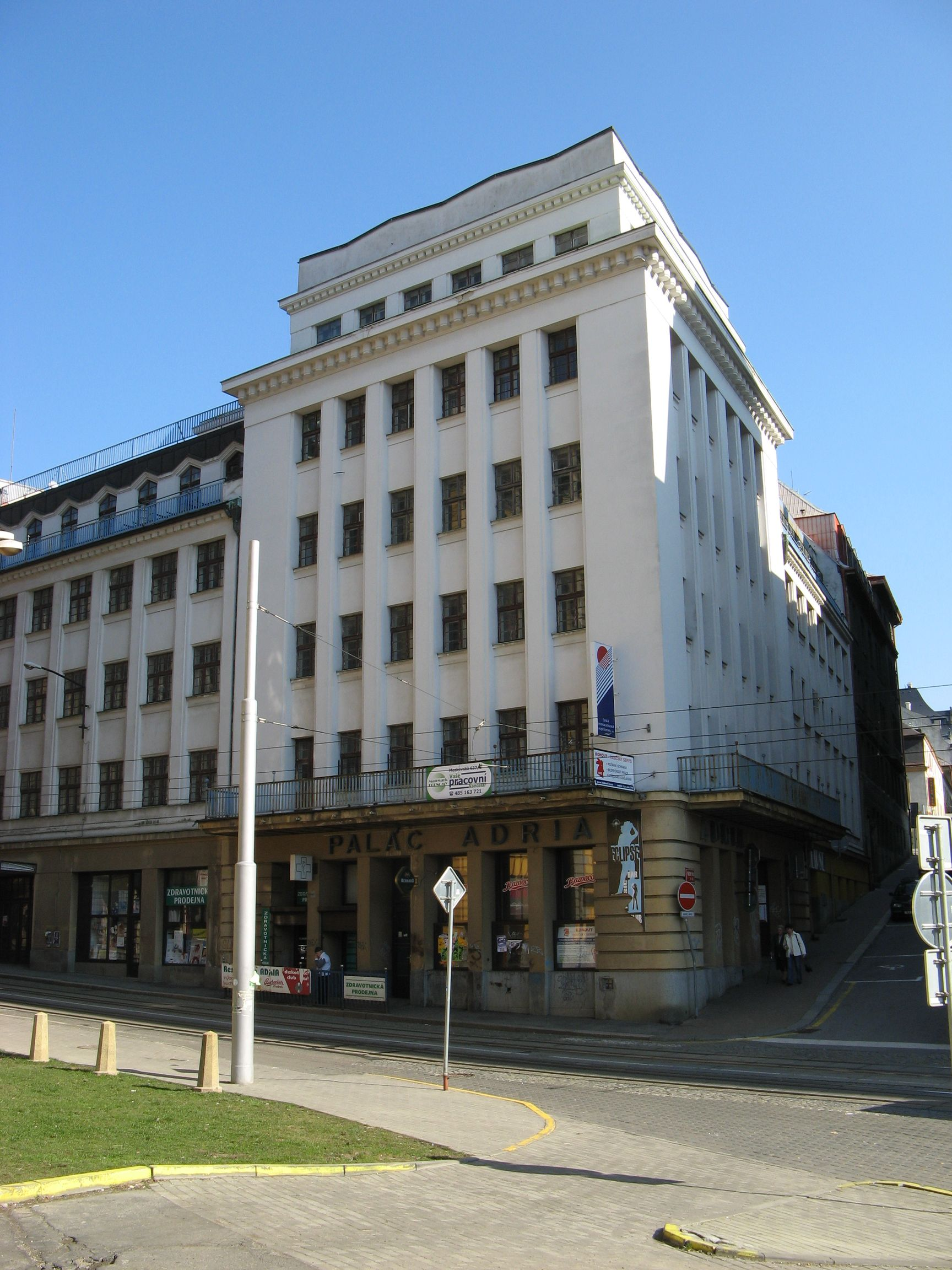 Palác Adria, Liberec, Architekt: Max Kühn